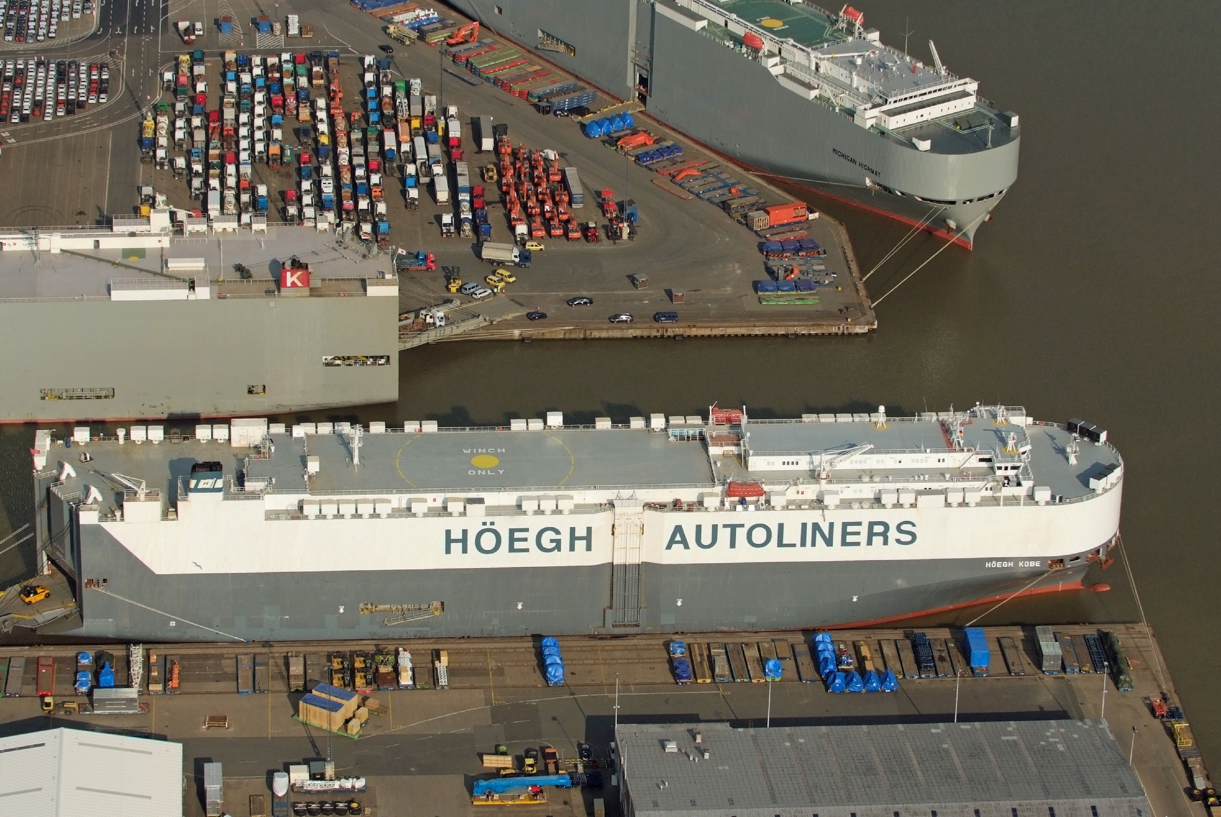 Autoliner HÖEGH KOBE (2006) / Fotoflug von Nordholz-Spieka nach Oldenburg und Papenburg